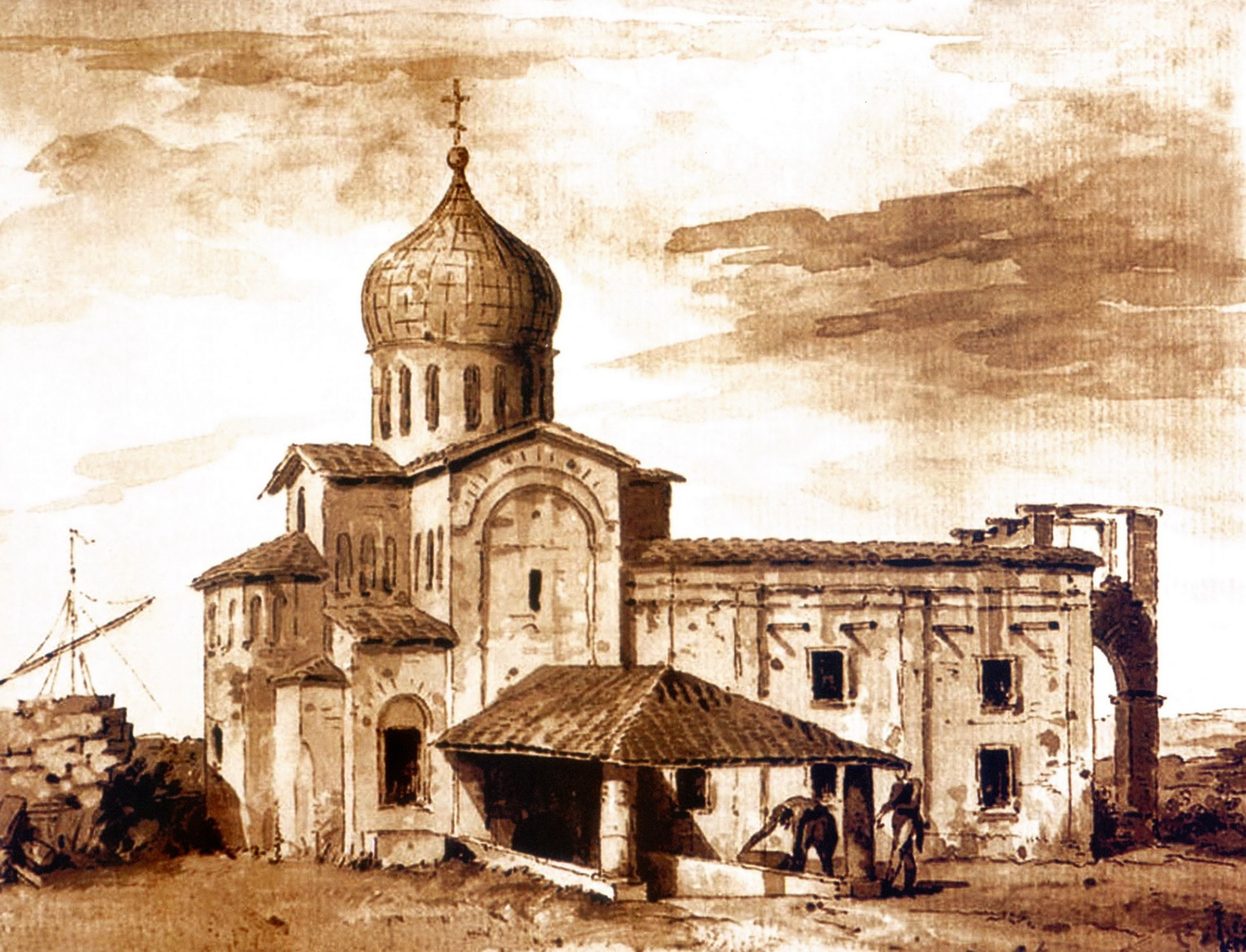 Храм Иоанна Предтечи. Акварель И.А.Иванова.